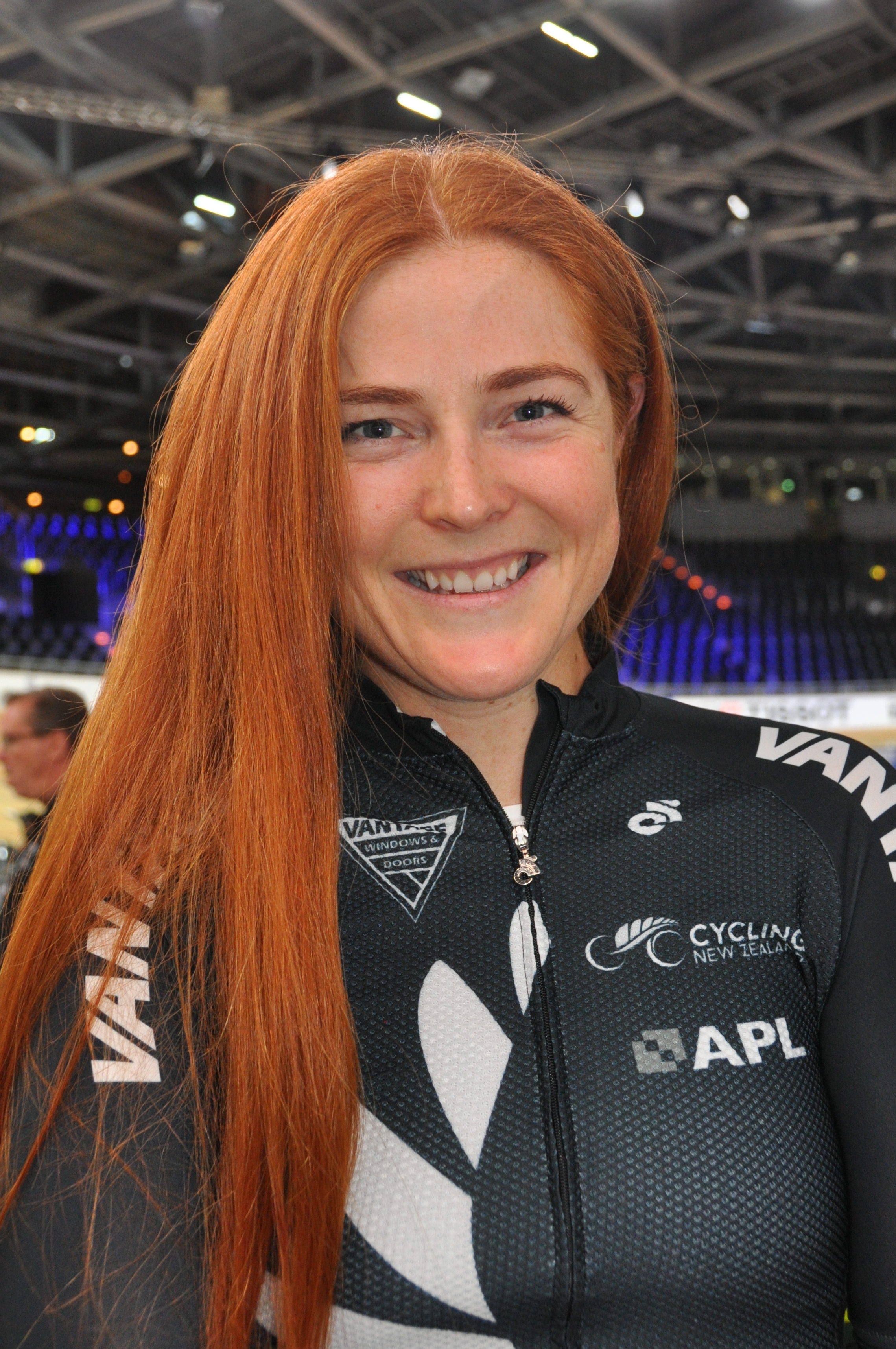 Kirstie James, Radsportlerin aus Neuseeland